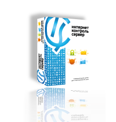 Коробка программы ИКС